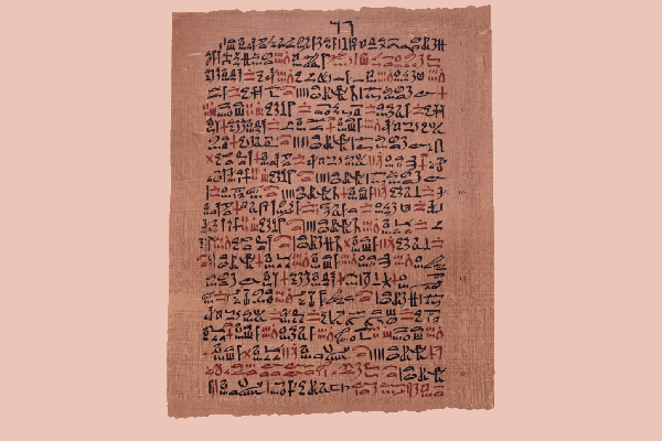 Ebers Papyrus from National Library of Medicine ( Found in Egypt in the 1870s, the Georg Ebers Papyrus contains prescriptions written in hieroglyphics for over seven hundred remedies. This prescription for an asthma remedy is to be prepared as a mixture of herbs heated on a brick so that the sufferer could inhale their fumes.